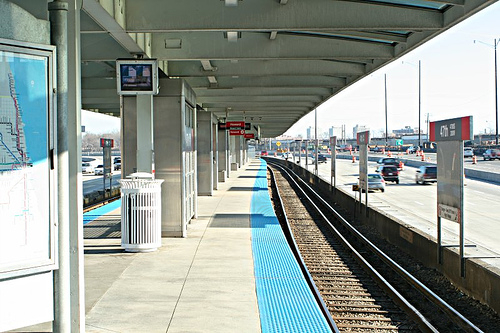 Photo de la station 47th